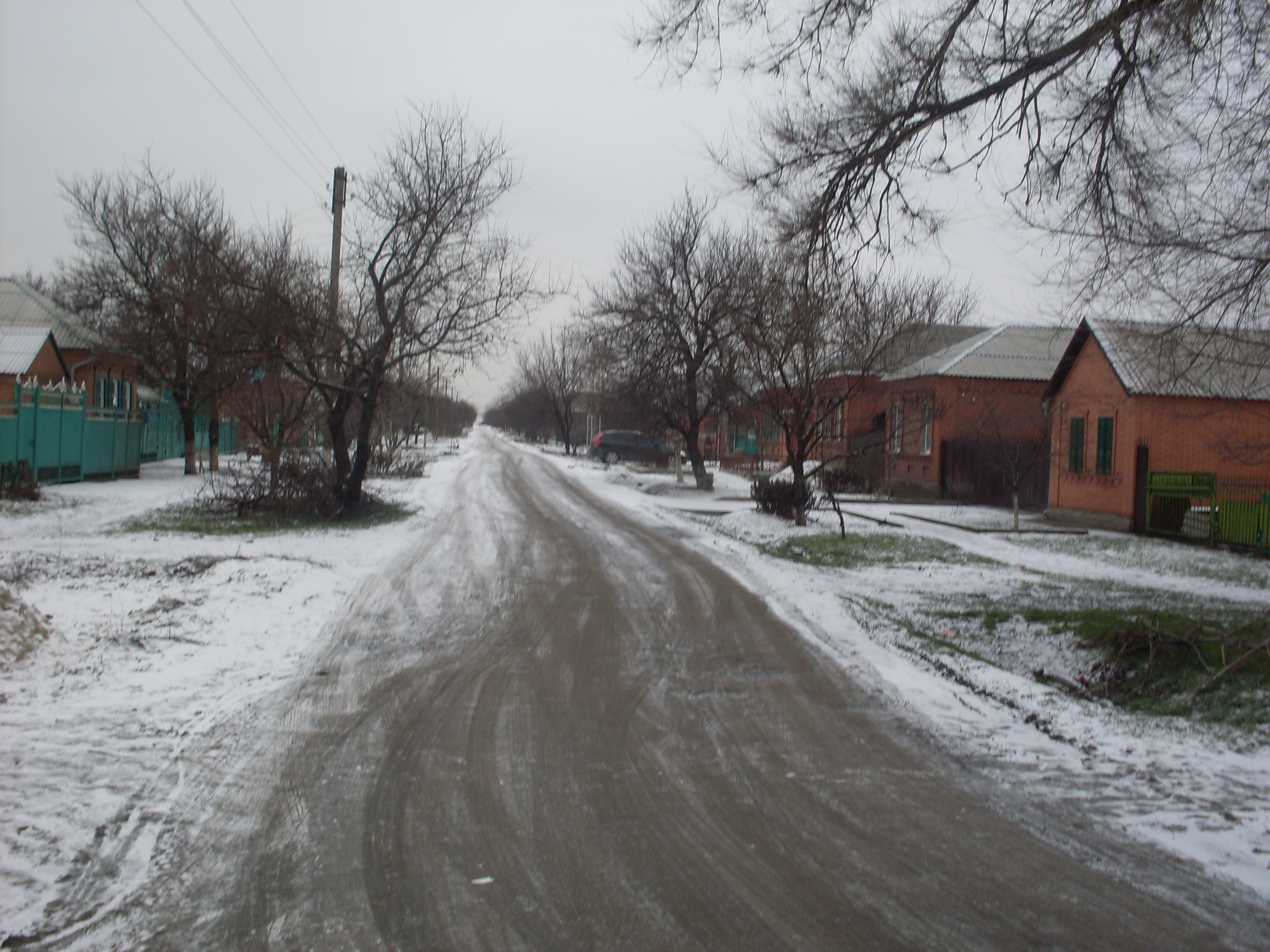 Койсуг